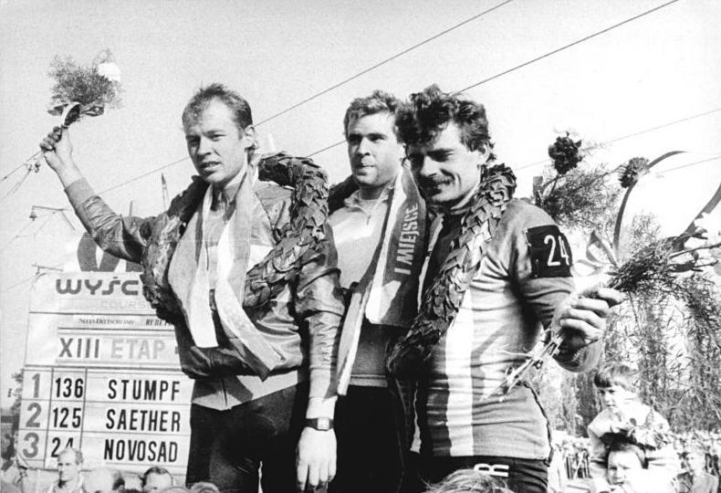 ADN-ZB Kasper 22.5.87 Polen: 40. Internationale Friedensfahrt-13. Etappe von Olesnica nach Lodz über 184 km-Siegerehrung für die drei Spitzenreiter dieser Etappe. Der 21jährige Friedensfahrt-Neuling Remig Stumpf (BRD-Mitte) gewann den Spurt vor Morten Sæther (Norwegen-links) und Anton Novosad (CSSR-rechts).